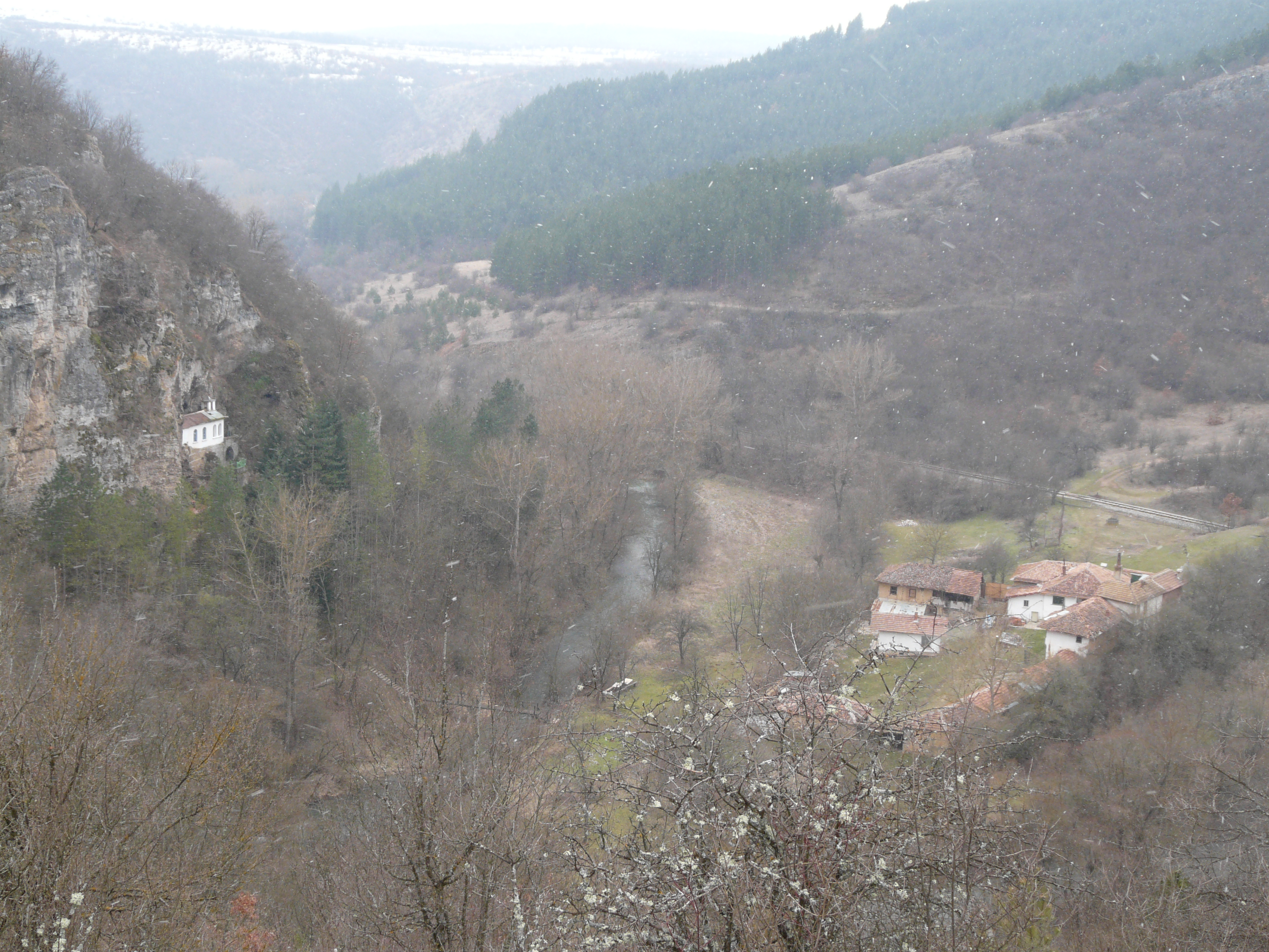 Манастир "Въведение Богородично" до село Разбоище.